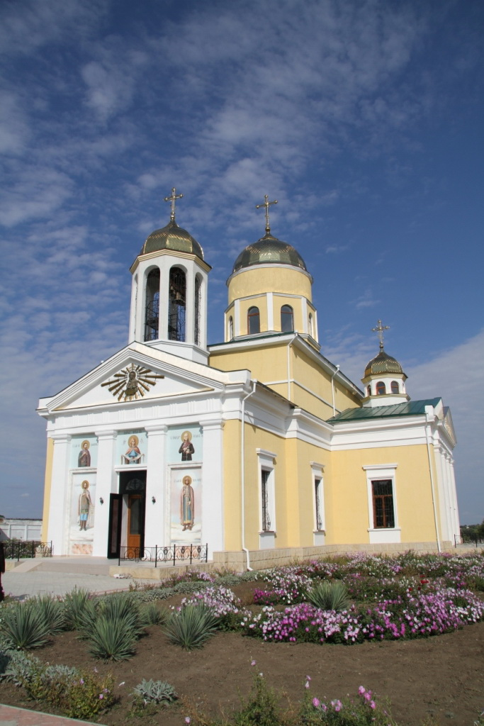 Храм Св. Благоверного князя Александра Невского в Бендерской крепости